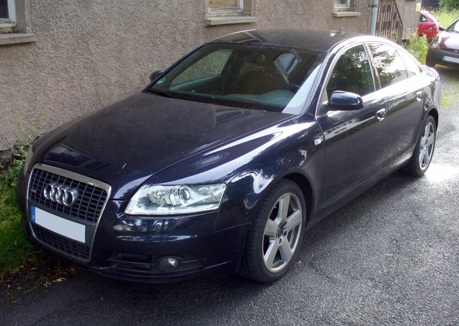 Audi A6 C6